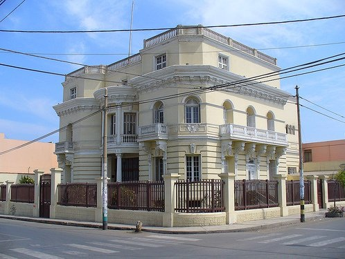 Casona Pittaluga en el Centro Histórico de Huacho. Declarado monumento de la Nación el 1 de agosto de 1995. Actualmente es propiedad de la empresa Edelnor.